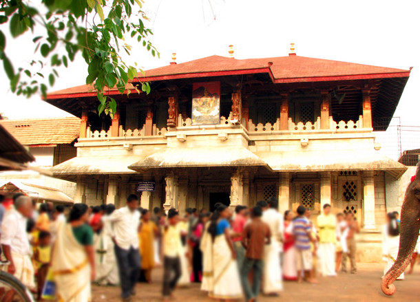 കൊല്ലൂർ മൂകാംബികാ ക്ഷേത്രകവാടം